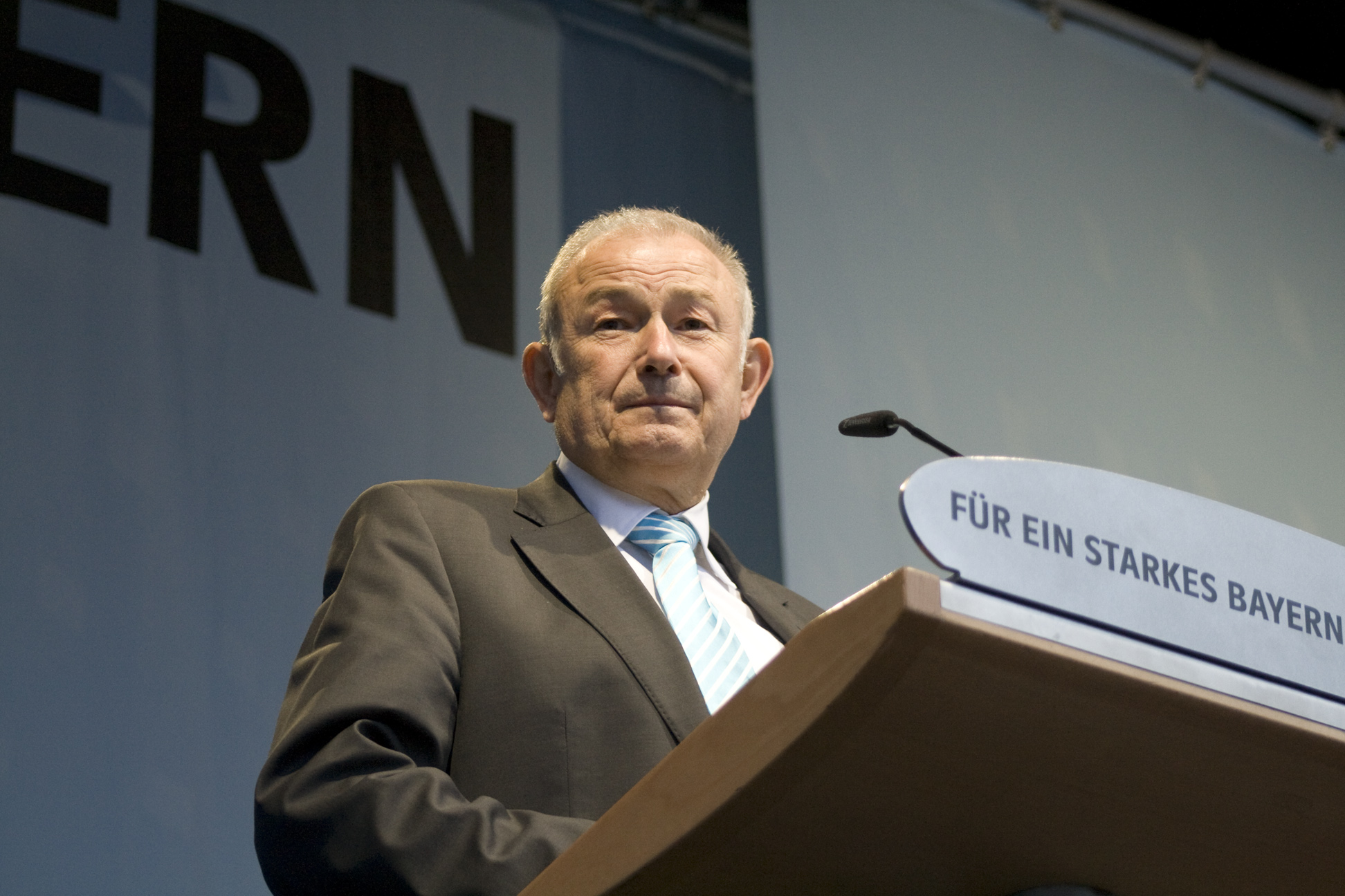 CSU-Politiker Günther Beckstein bei einer Wahlkampfrede in Würzburg